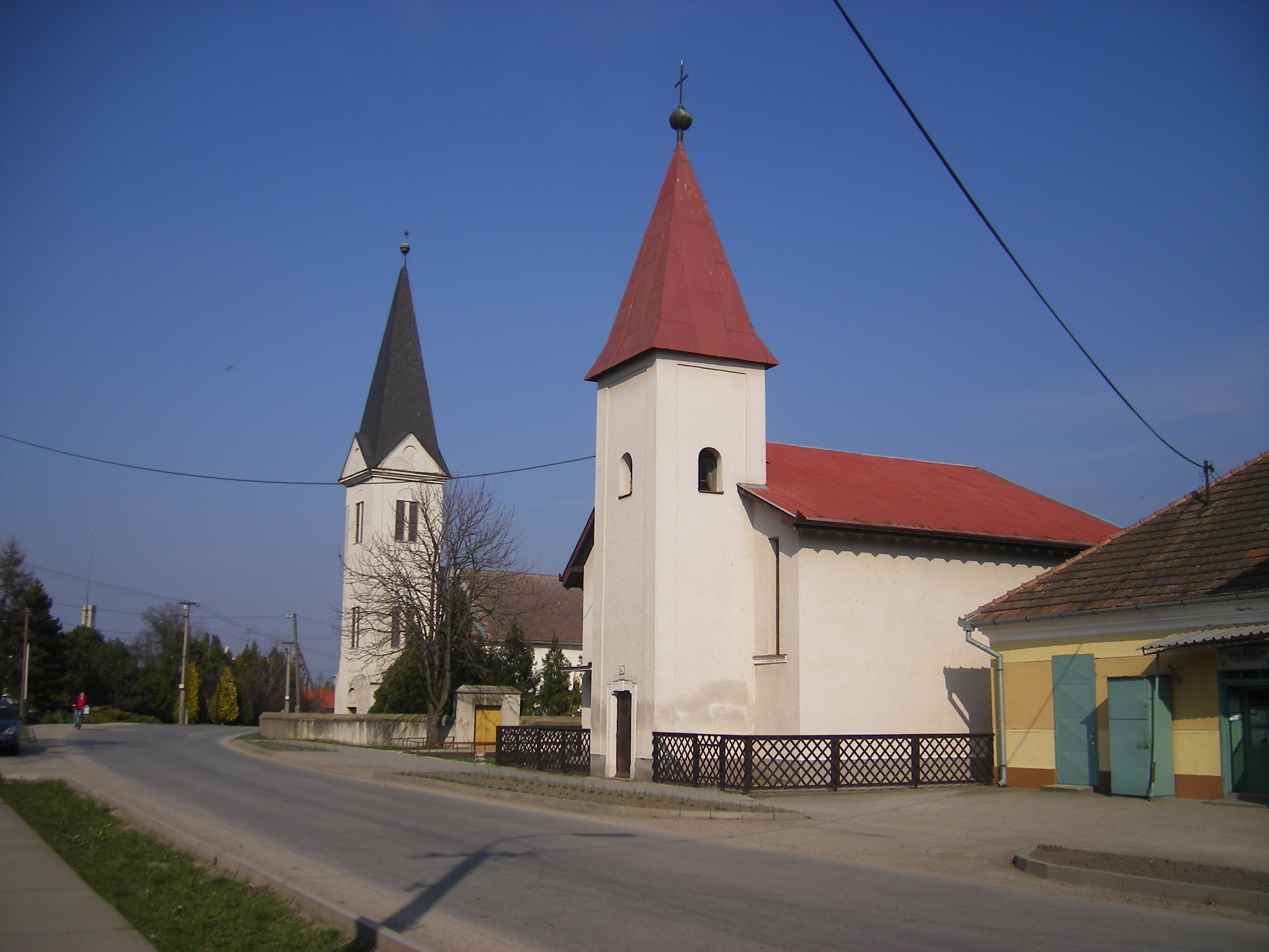 Lakszakállas katolikus és református temploma